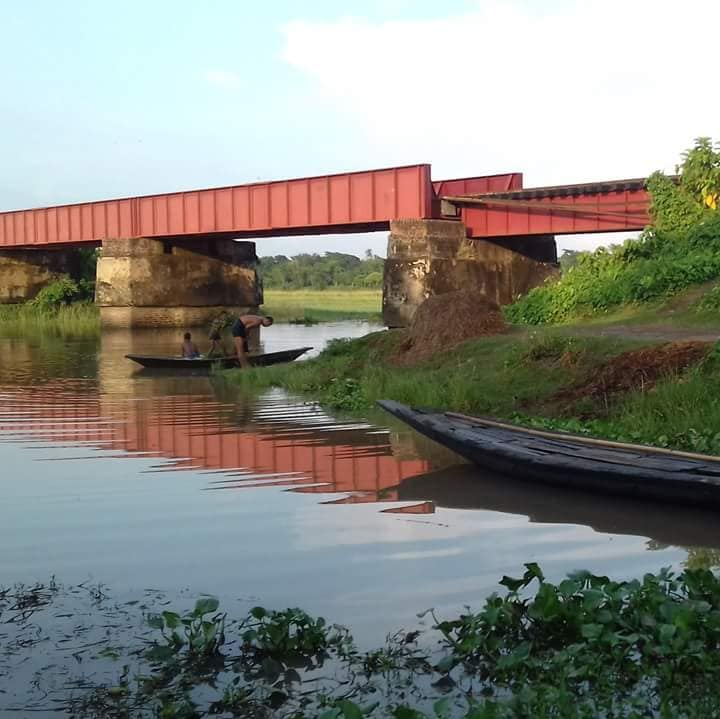 brahmangram